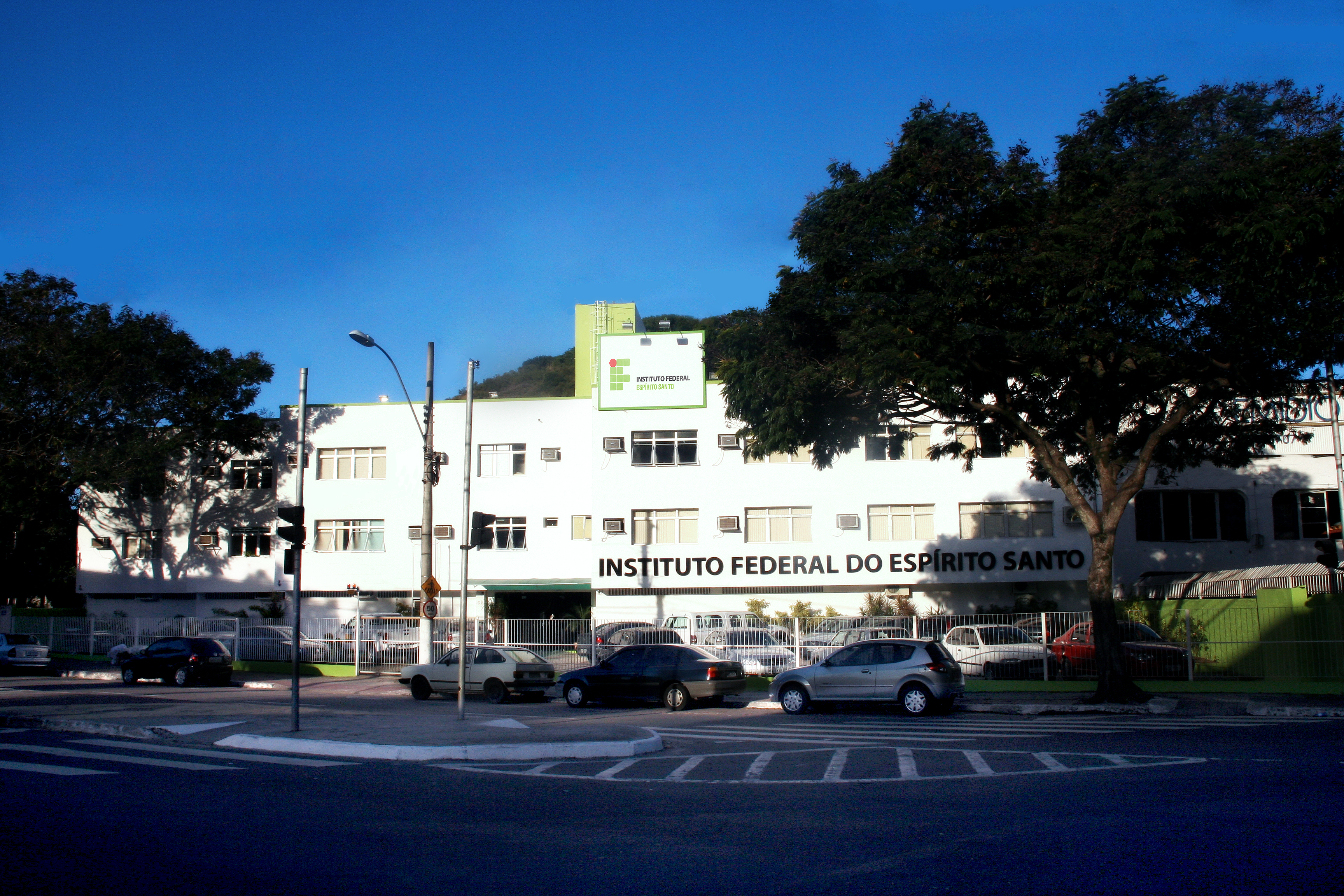 Reitoria do Ifes